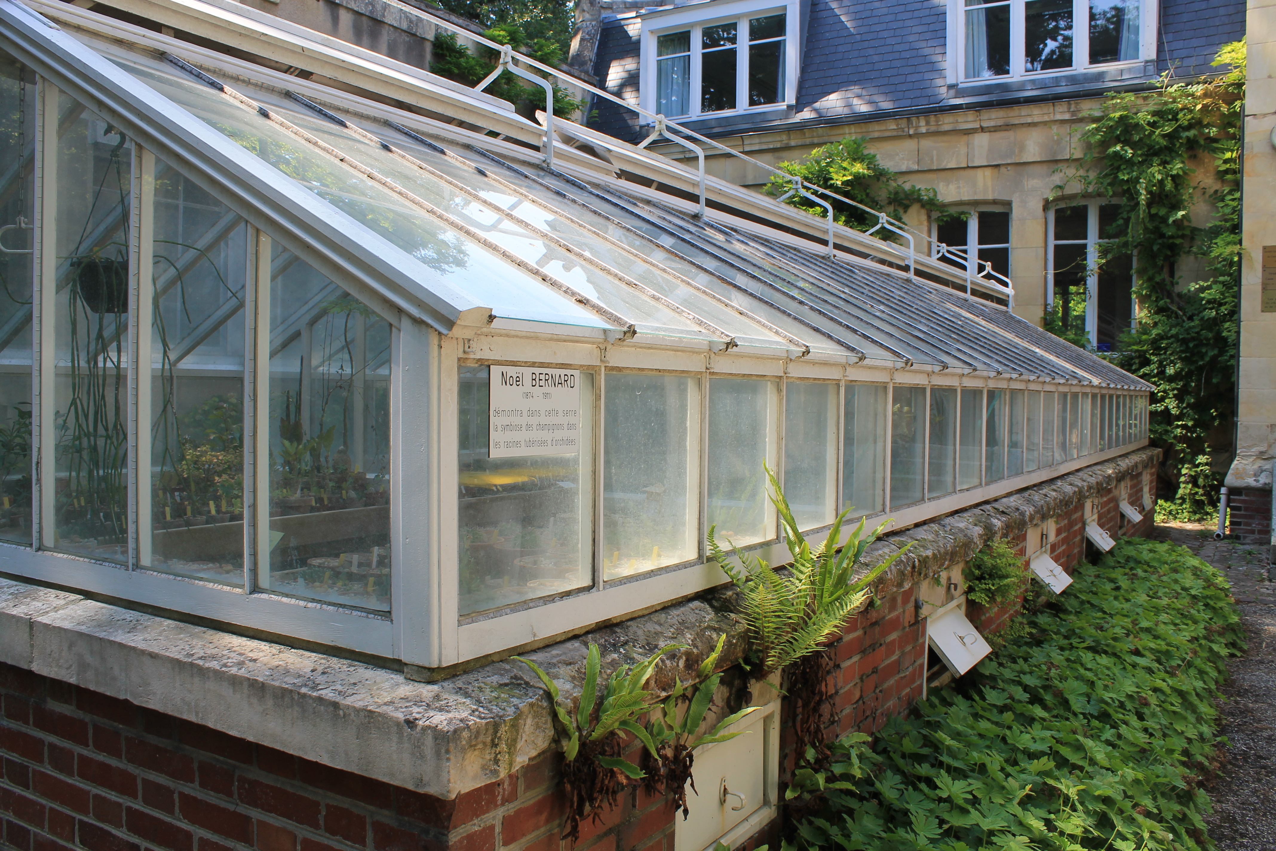 Serre de recherches expérimentales de l'institut botanique du Jardin des Plantes de Caen (Calvados) Plaque commémorative: Noël BERNARD (1874-1911) démontra dans cette serre la symbiose des champignons dans les racines tubérisées d'orchidées.